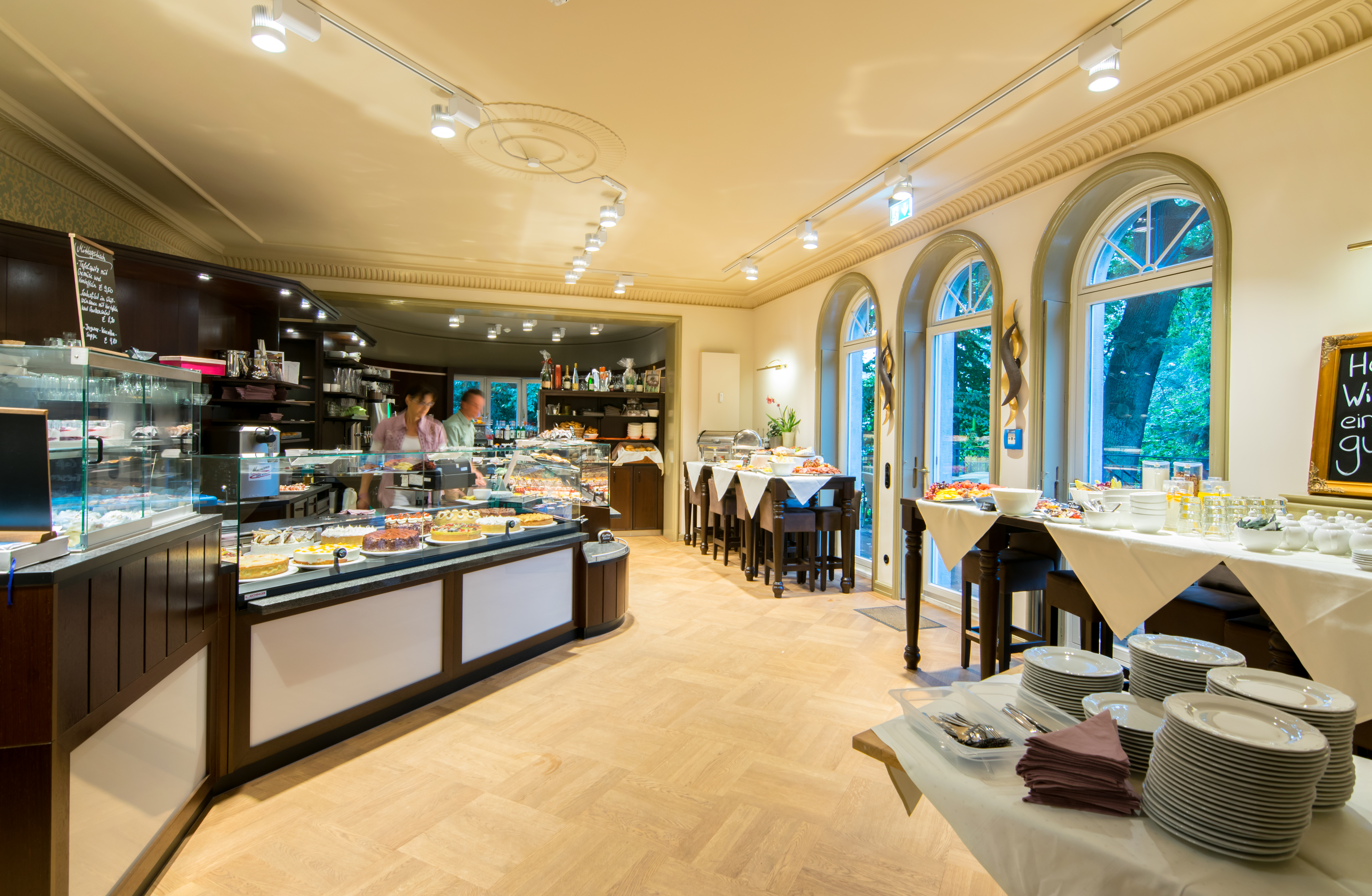 HH-Volksdorf Ohlendorffsche Villa Verkaufsraum